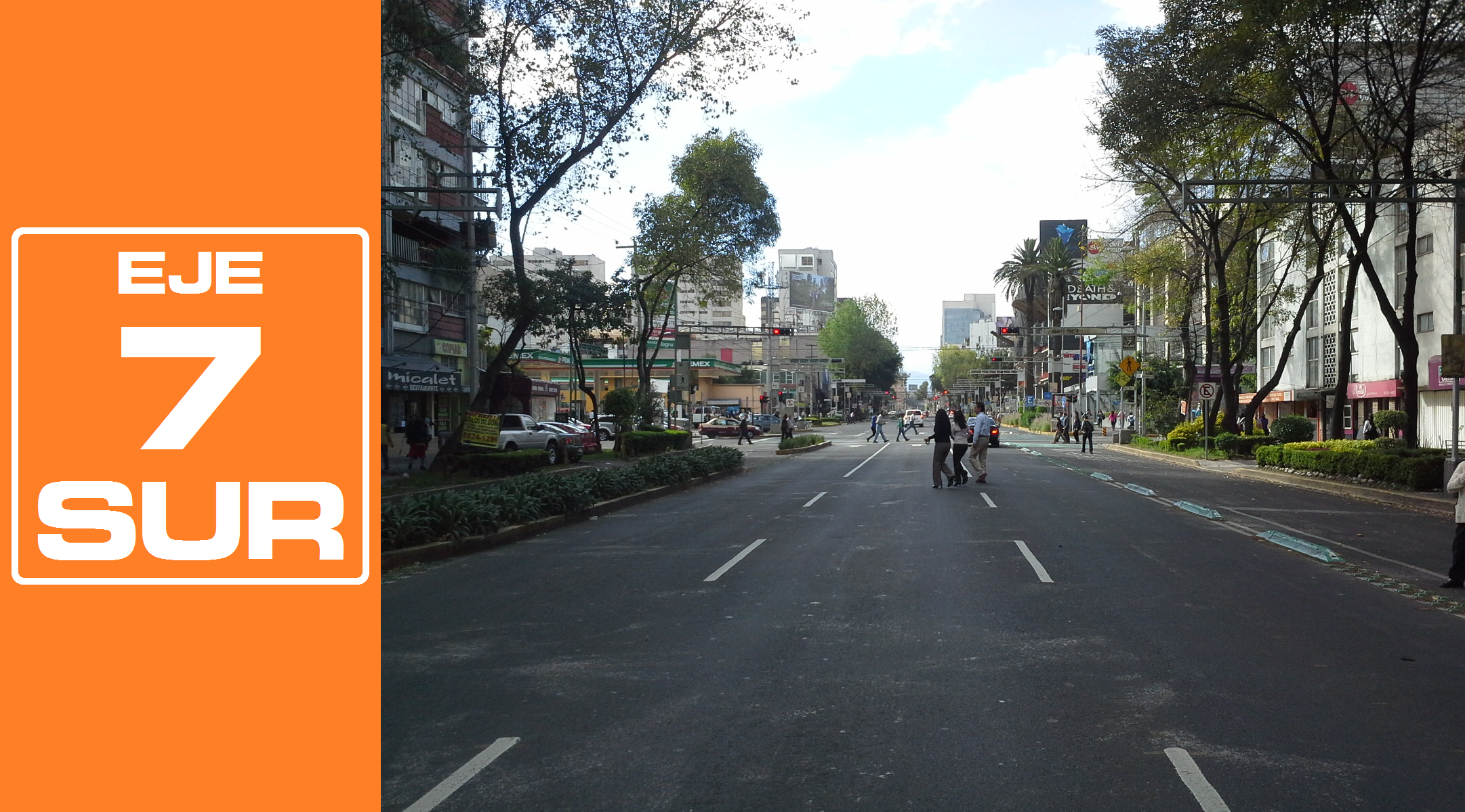 Rediseñado original de la señalética de los Ejes viales de la Ciudad de México por José García (Wiki ID: narumiyama)